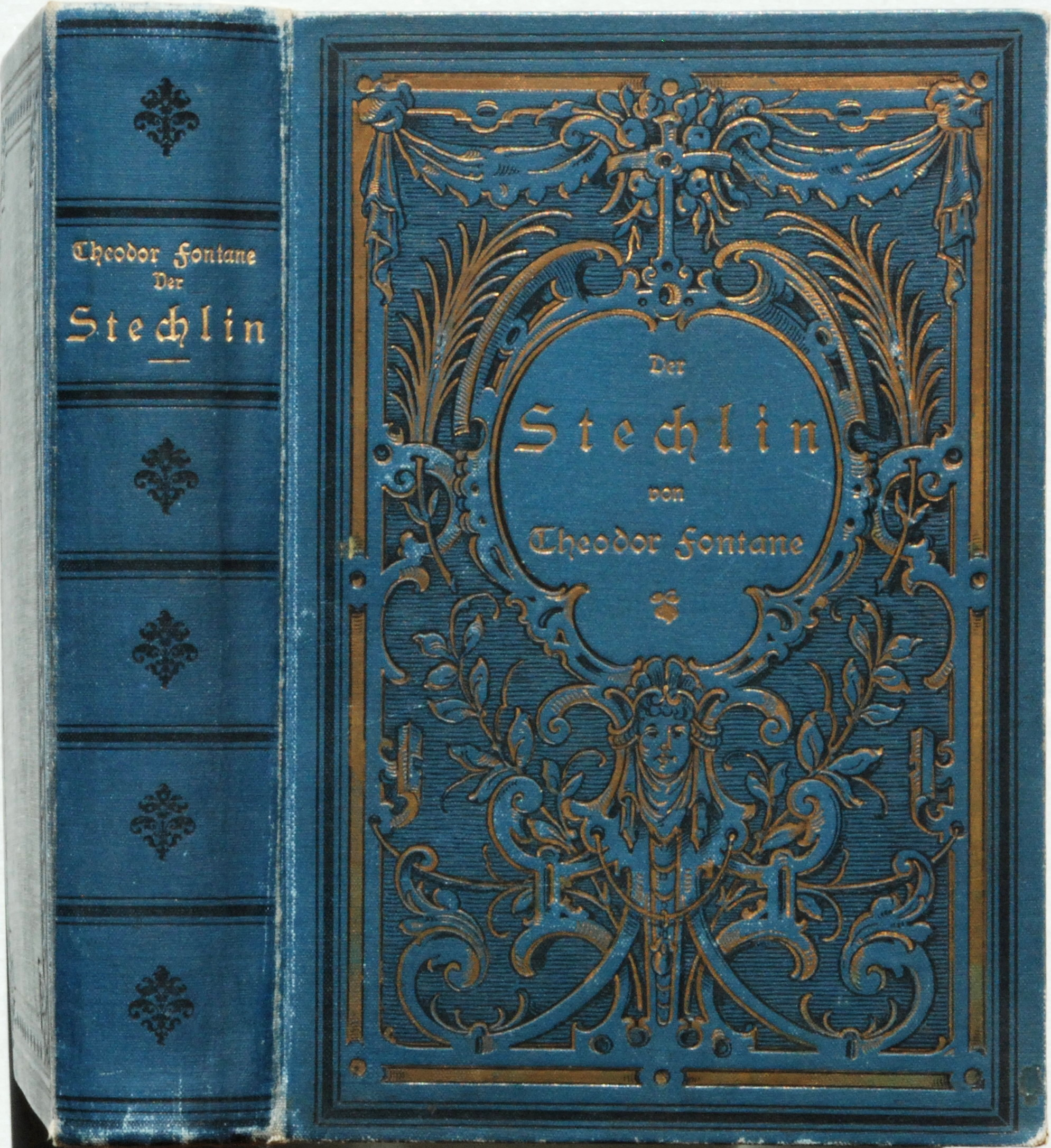 Original-Einband der ersten Buchausgabe 1899